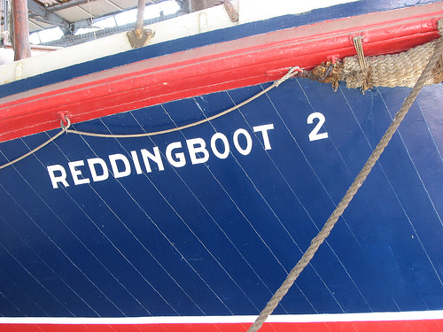 Bildo el la antverpeno ŝipmuzeo.